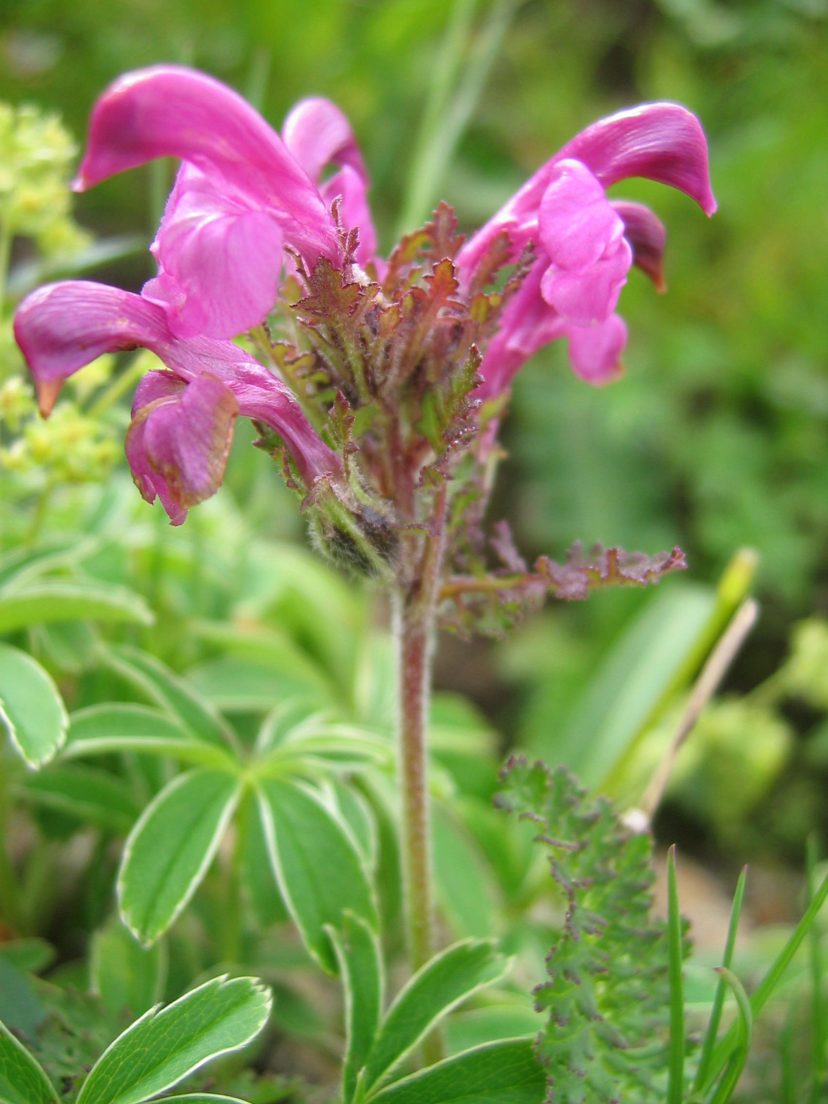 Pedicularis kerneri : Lac de la Grande Sitre - Belledonne - France (38)